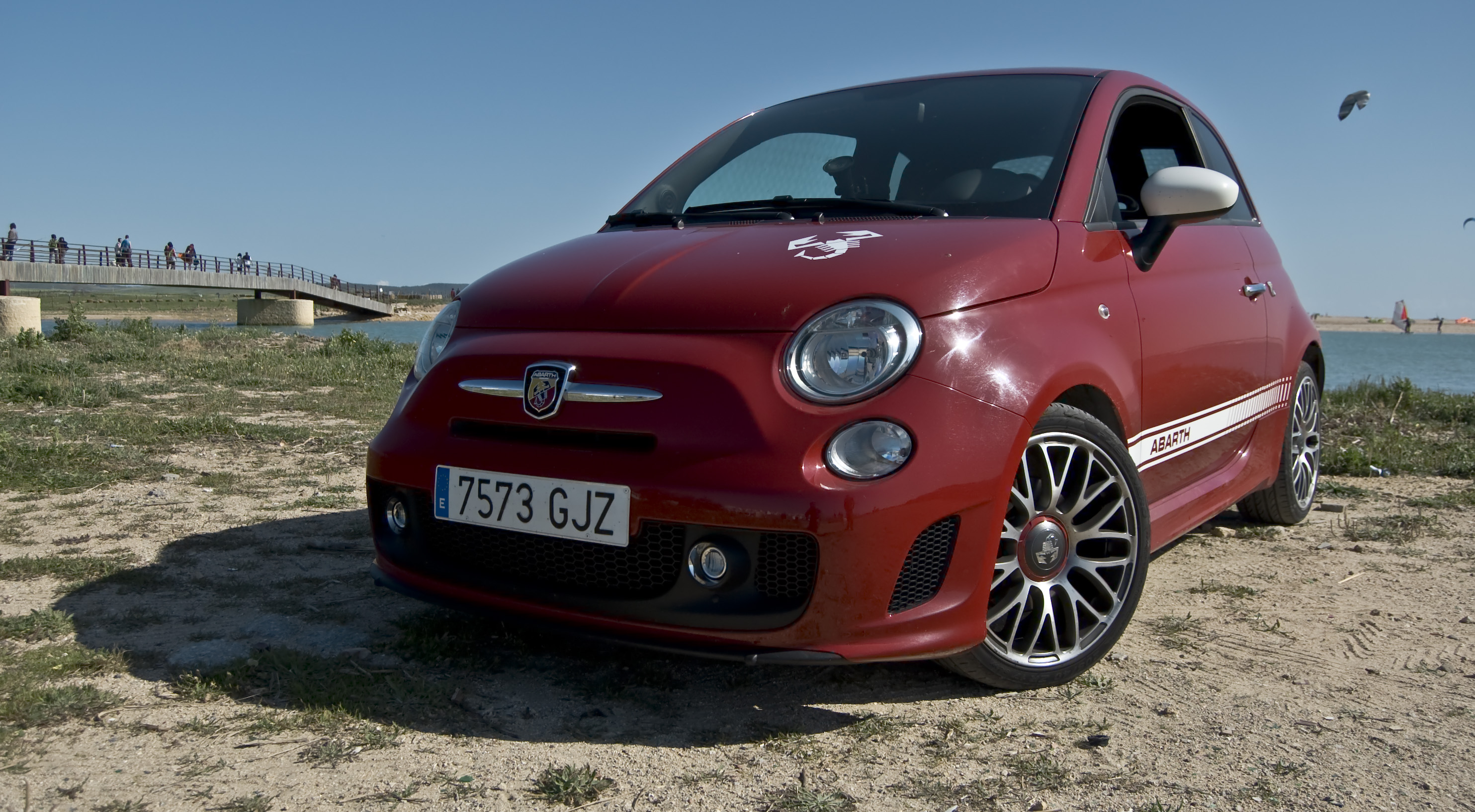 Prueba del Abarth 500 y photoshoot para Diariomotor